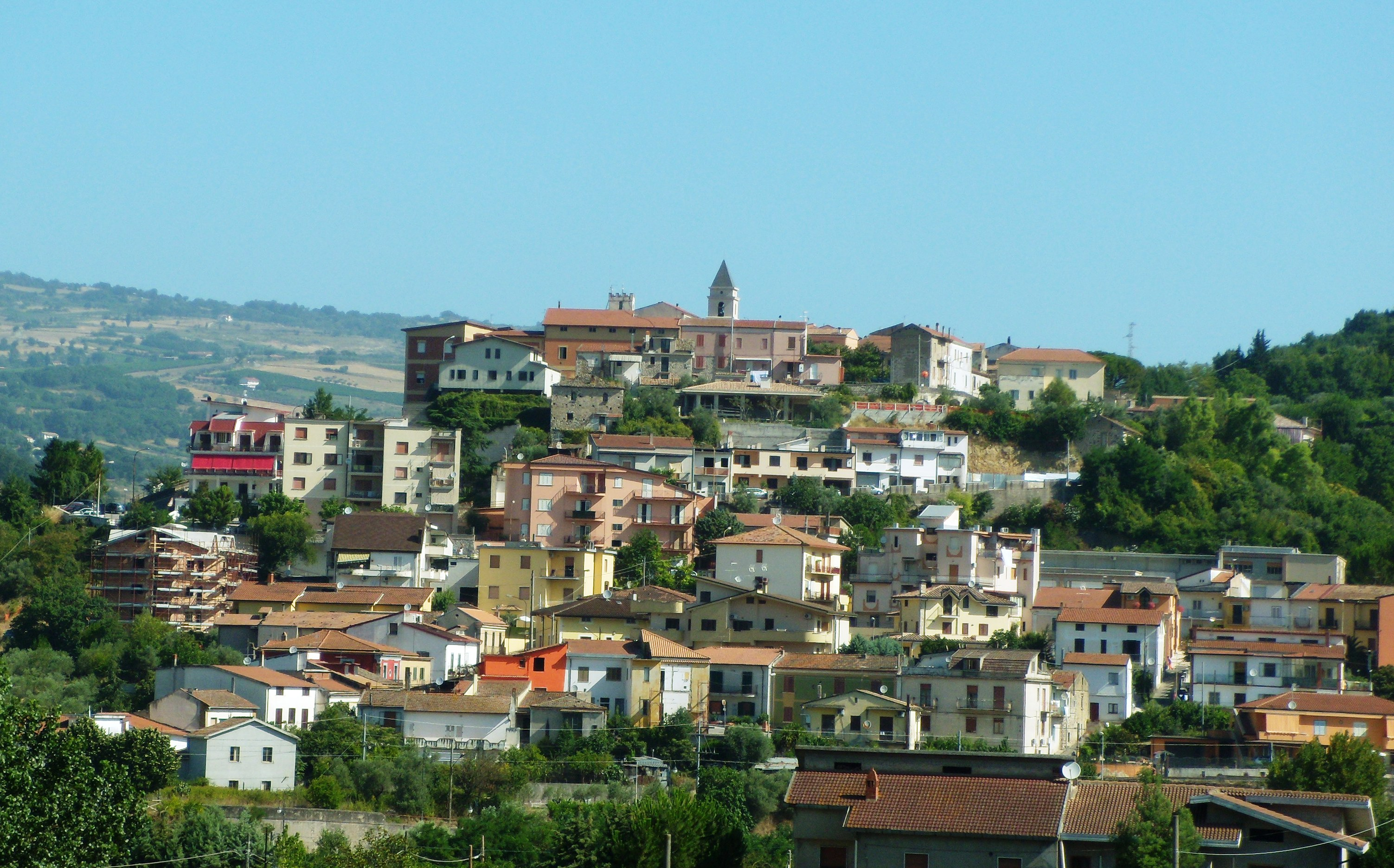 Panorama del centro abitato di Ponte (provincia di Benevento) dalla Strada Statale n. 372 (Strada Statale Telesina).